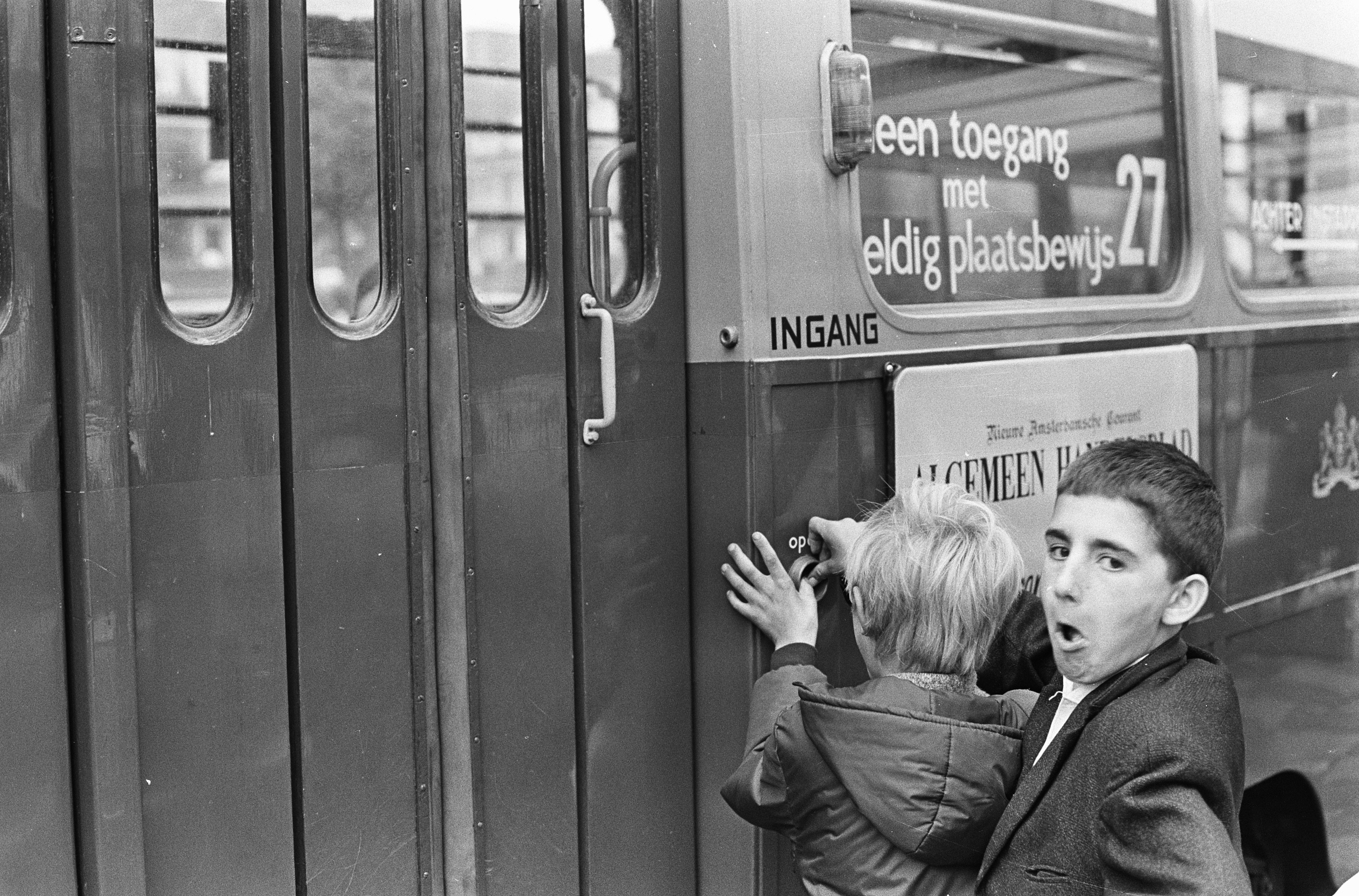 Collectie / Archief : Fotocollectie Anefo Reportage / Serie : [ onbekend ] Beschrijving : "Dievenwagen" tramlijn 27 in bedrijf genomen. Druk op de knop en deur is open Datum : 11 september 1967 Locatie : Amsterdam, Noord-Holland Trefwoorden : jeugd, openbaar vervoer, trams, verkeer Fotograaf : Kroon, Ron / Anefo Auteursrechthebbende : Nationaal Archief Materiaalsoort : Negatief (zwart/wit) Nummer archiefinventaris : bekijk toegang 2.24.01.05 Bestanddeelnummer : 920-6906